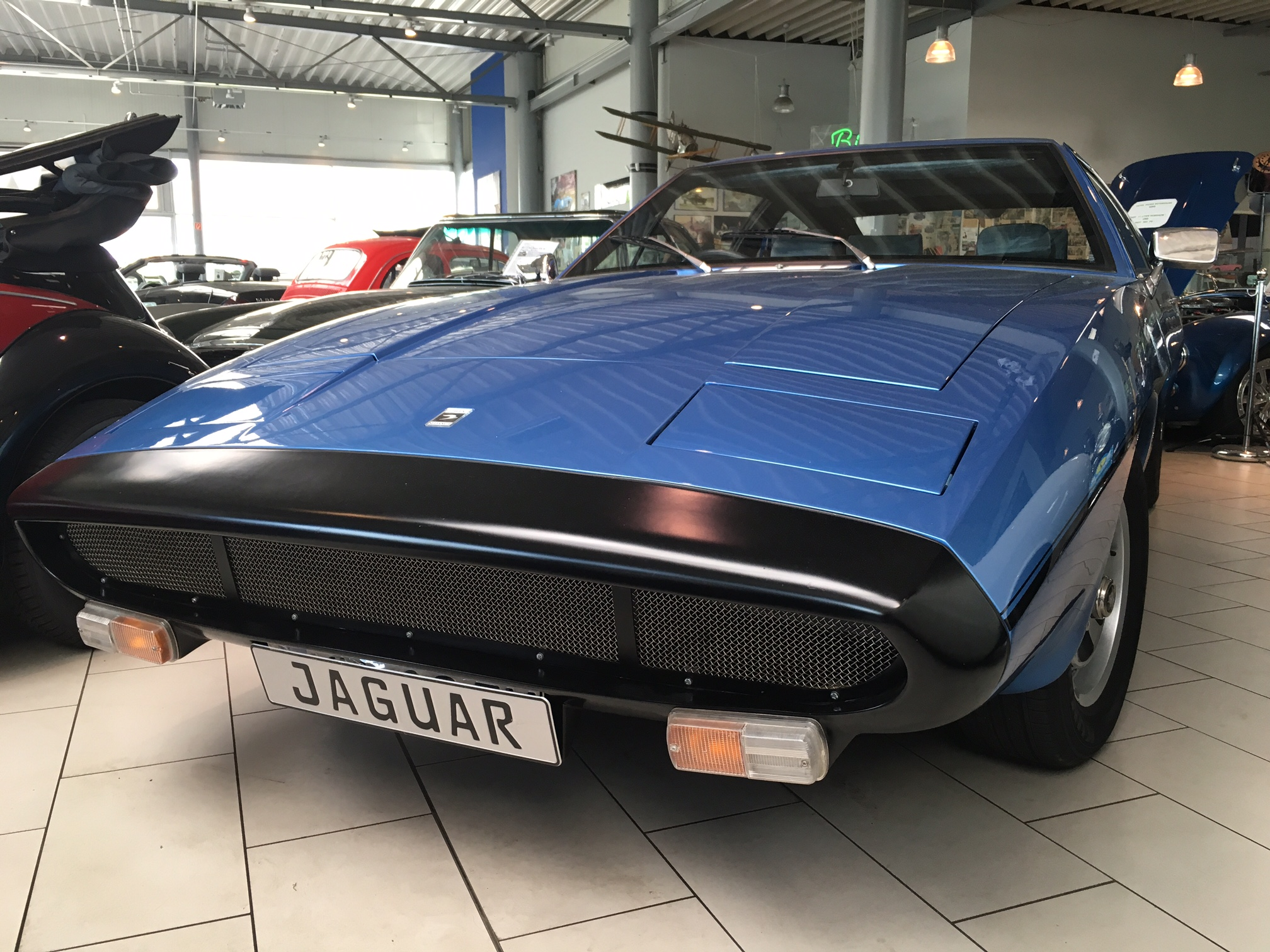 Frontansicht